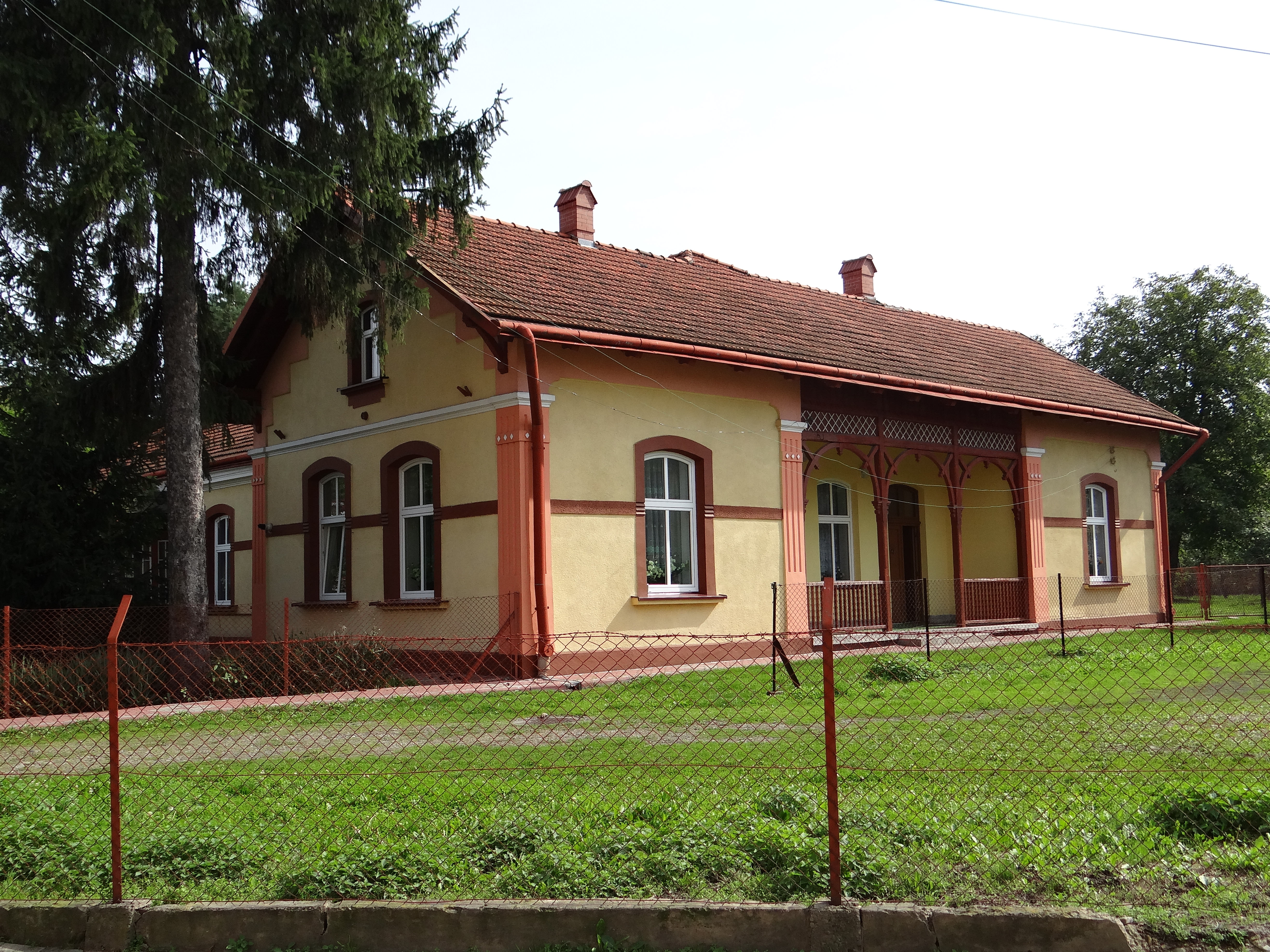 Przeworsk, spichrz, 1869